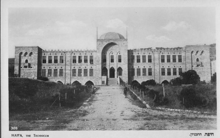 הטכניון